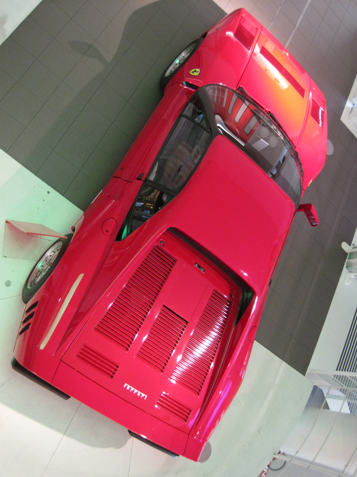 Automobiles in the Galleria Ferrari - Ferrari GTO